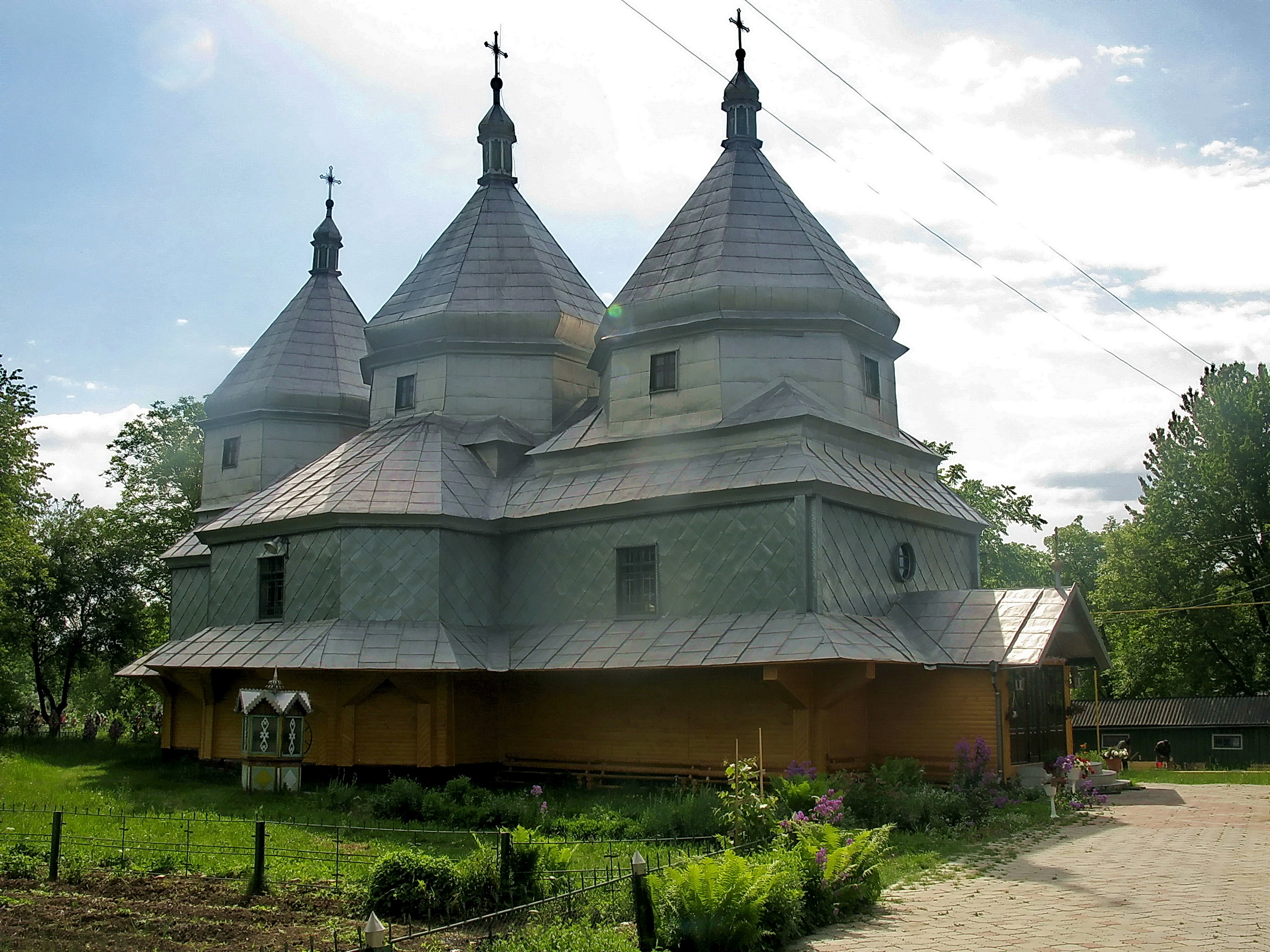 Церква Іоанна Сучавського та дзвіниця (дер.), с. Мигове